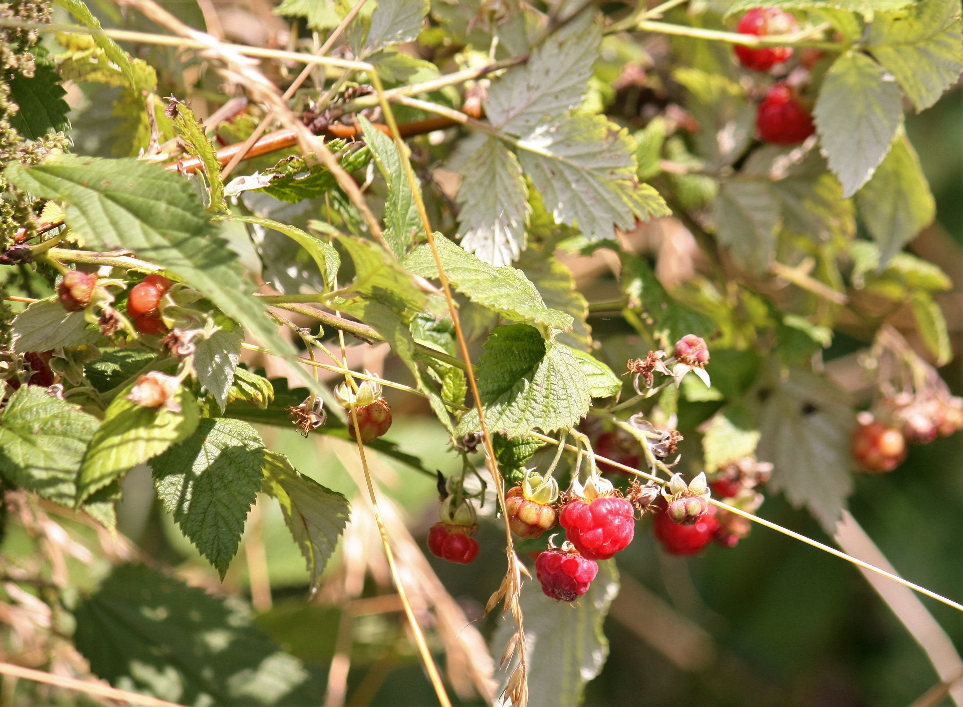 Wilde Himbeeren im Schwabener Moos